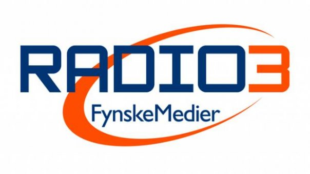 Radio 3 Fynske Medier